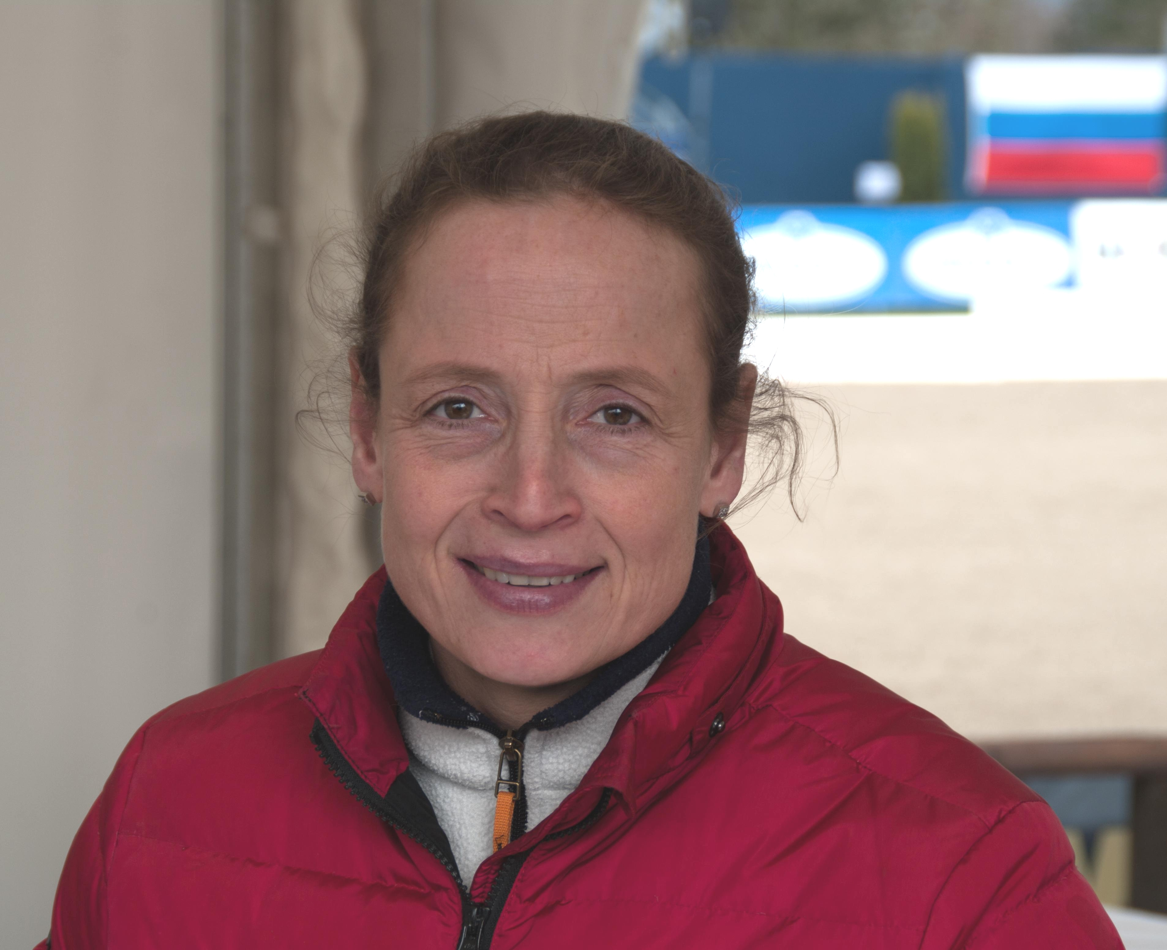 Isabell Werth bei Horses & Dreams 2013